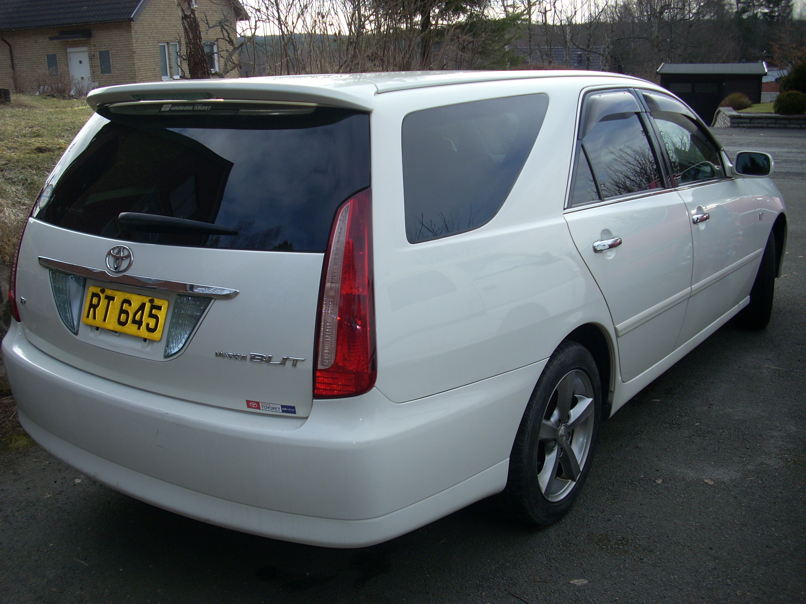 Toyota Mark II Blit, med registreringsskylt från Luxemburg